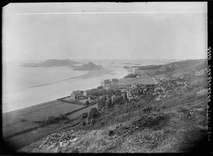 Trebeurden plage de Tresmeur